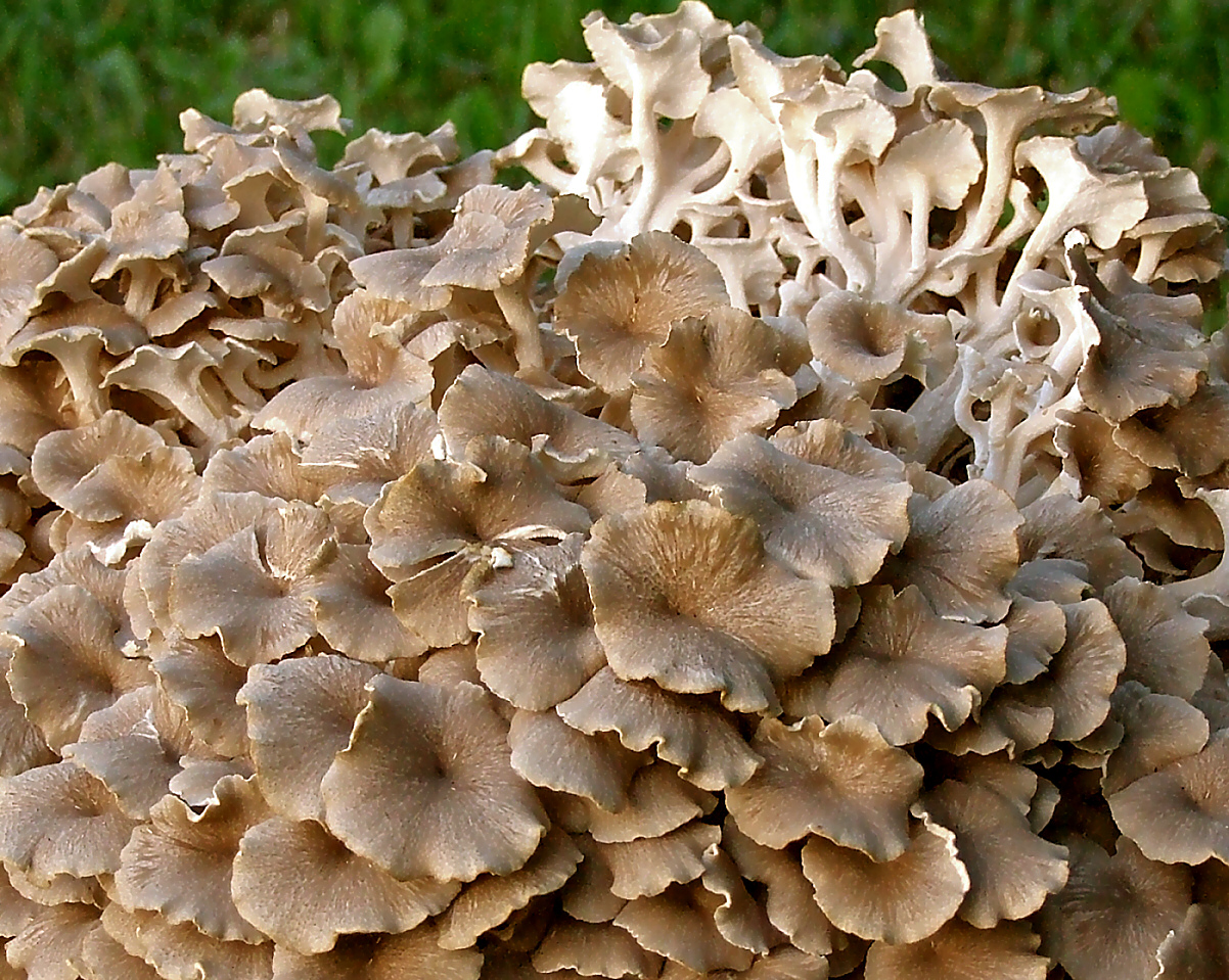 Polyporus umbellatus (syn. Grifola umbellata)